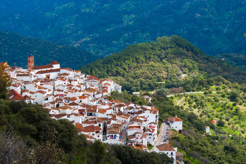 Algatocin